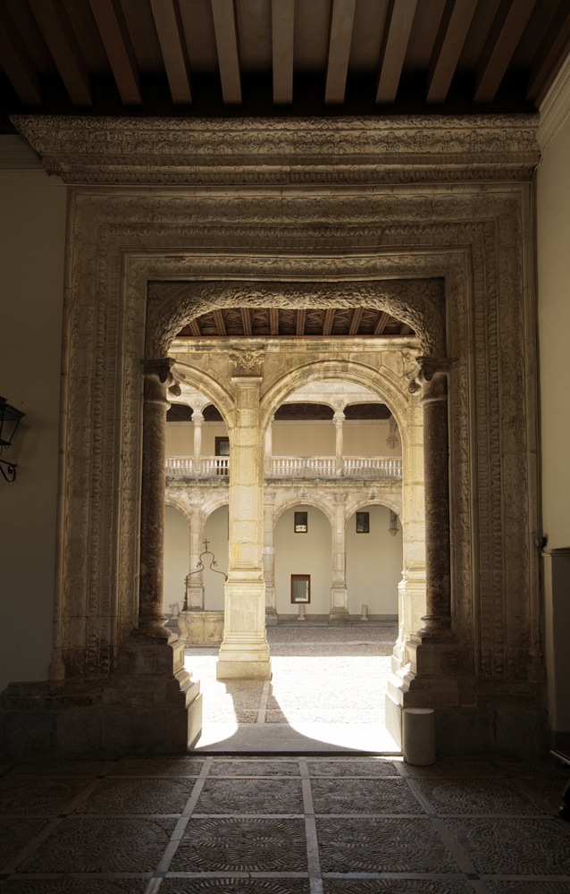 Portada del zaguán al patio del Palacio de Avellaneda, Peñaranda de Duero (Burgos).